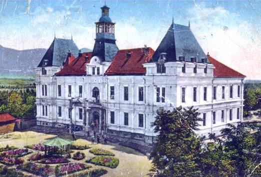 Стара полихромирана снимка на сарајот (дворецот) на Нијази-бег во Ресен во кој денес се наоѓаат Домот на културата „Драги Тозија“ и Ресенската Керамичка Колонија.